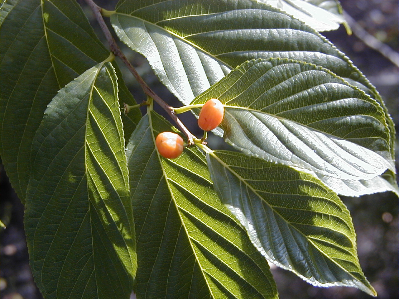 Rhamnela franguloides. Real Jardín Botánico de Madrid.